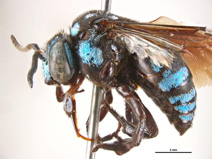 Thyreus nitidulus male